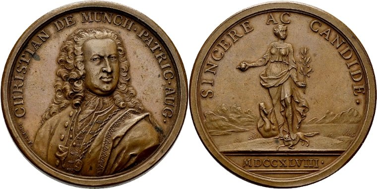 Bronzemedaille mit Abbildung des Augsburger Patriziers Christian de Munch (1690-1757). Rückseitig Abbildung einer weiblichen Gestalt mit Herz in der linken und Lorbeerzweig in der rechten Hand, dem rechten Fuß auf einem Fuchs, links neben ihr ein Schwan